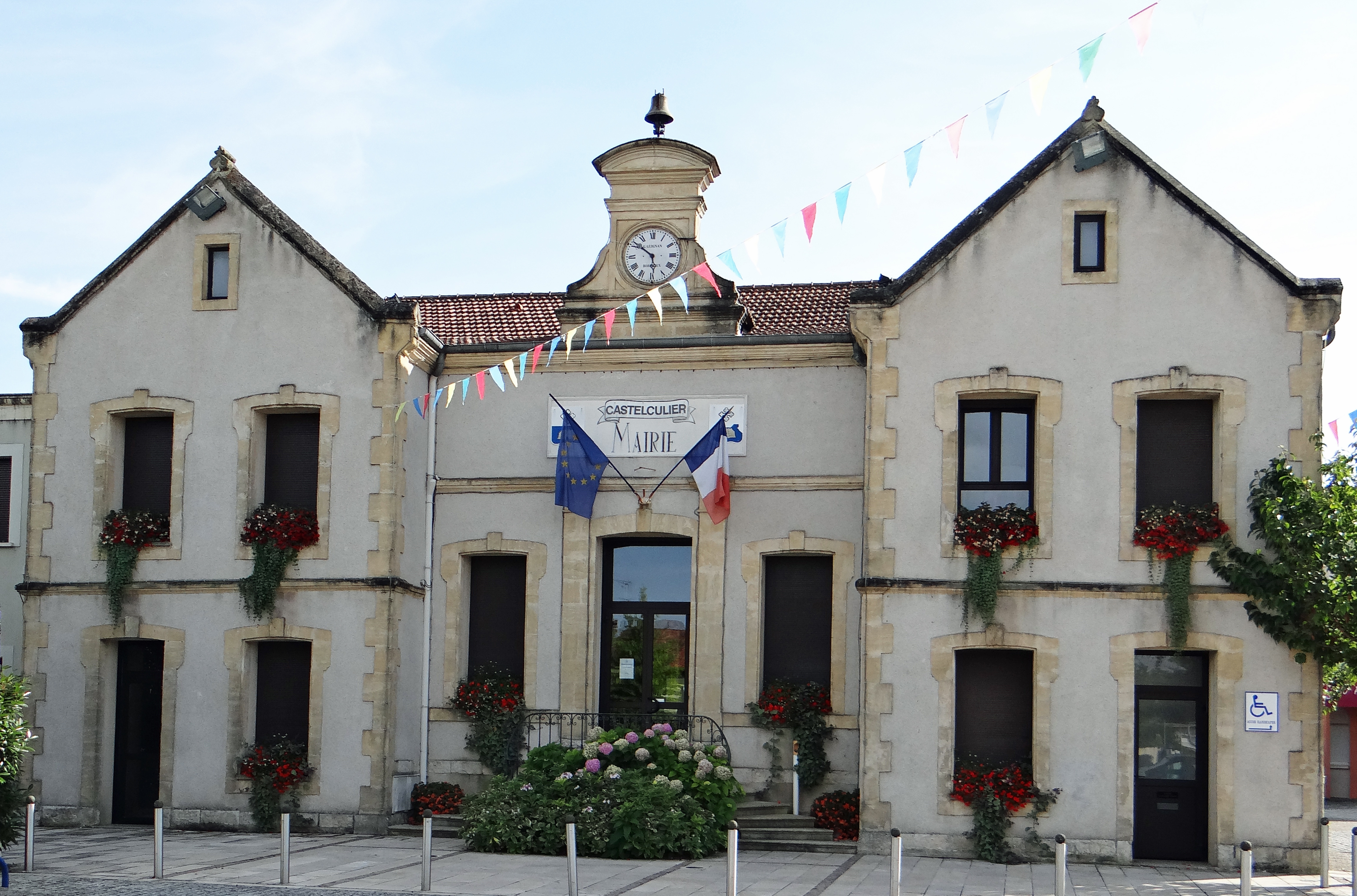 Castelculier - Mairie